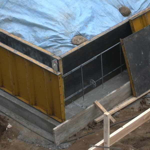 欠陥住宅_木造_基礎_01